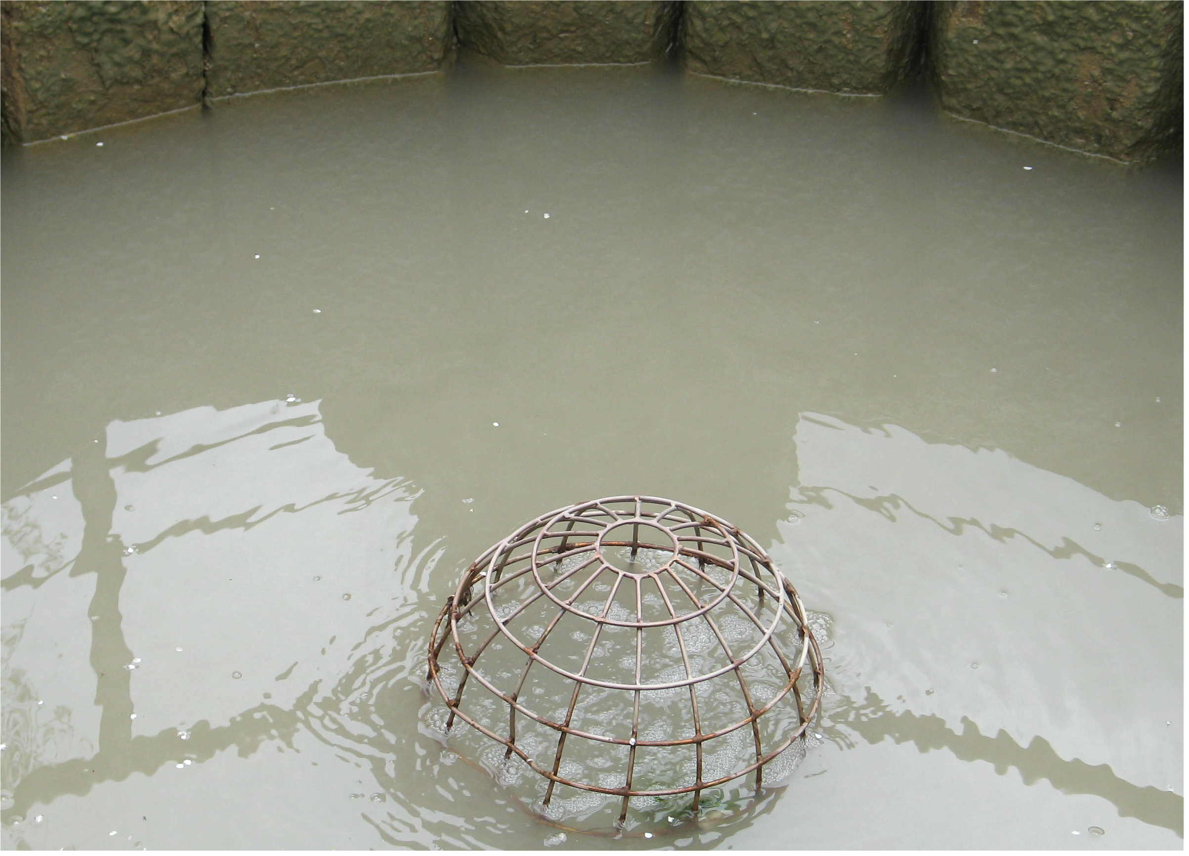 De Brubbel zu Wallenborn (Vulkaneifel) a rouegem Zoustand.